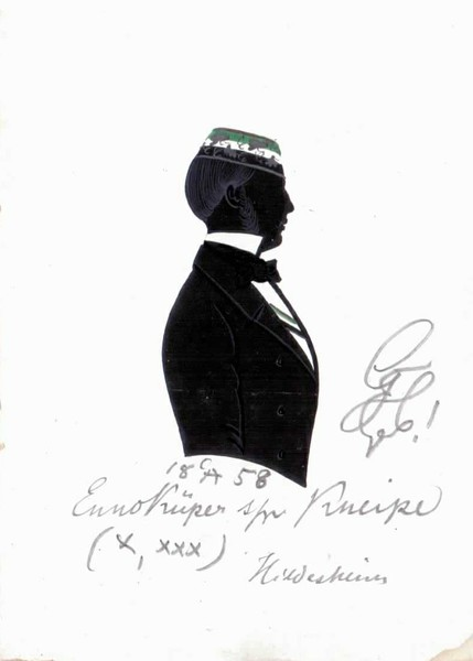 Silhouette von Ernst August (Enno) Küper